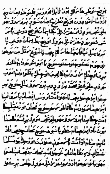 Старонка кітаба ХІХ ст.